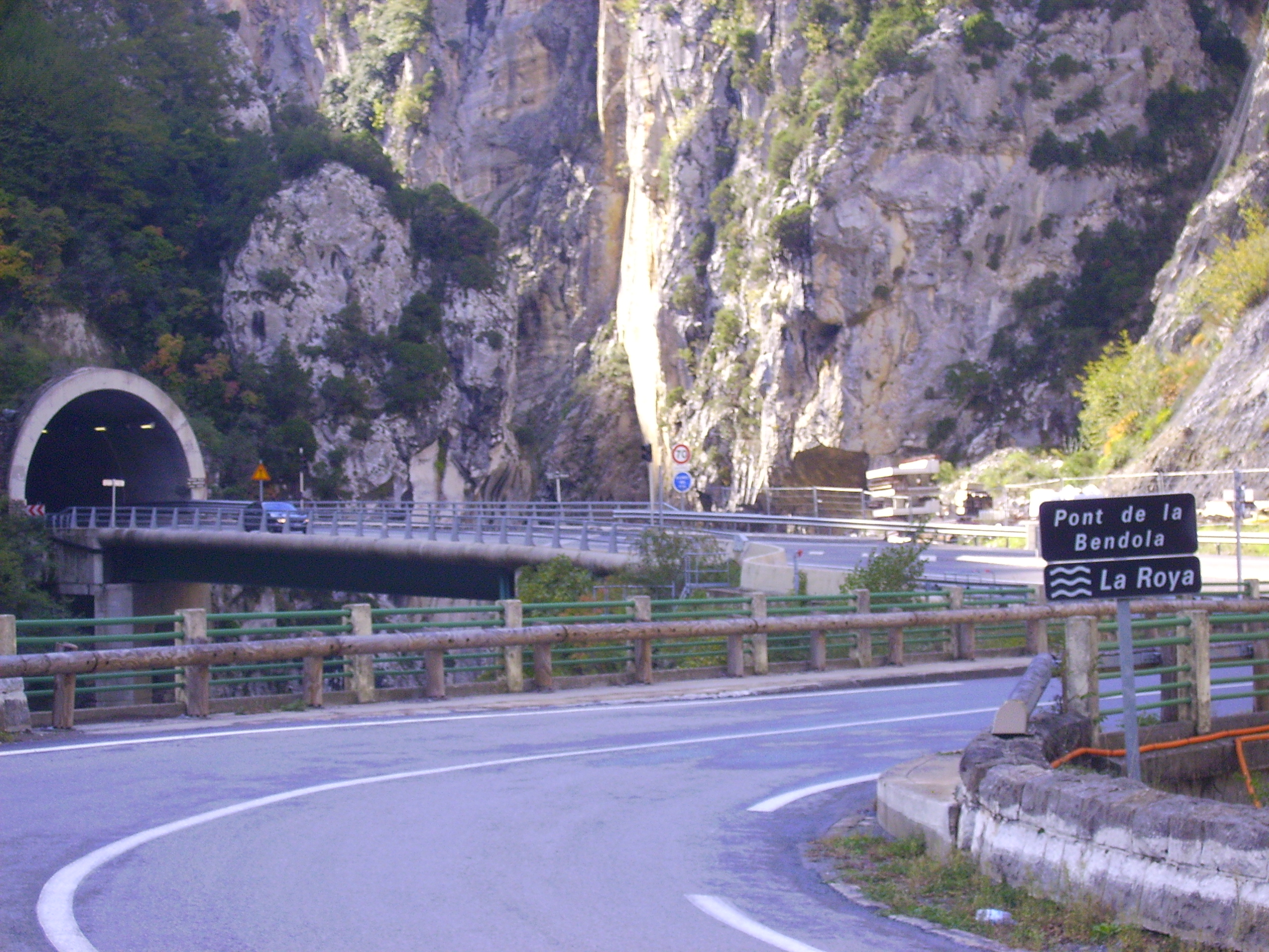 Lone de Saorge au pont de la Bendola